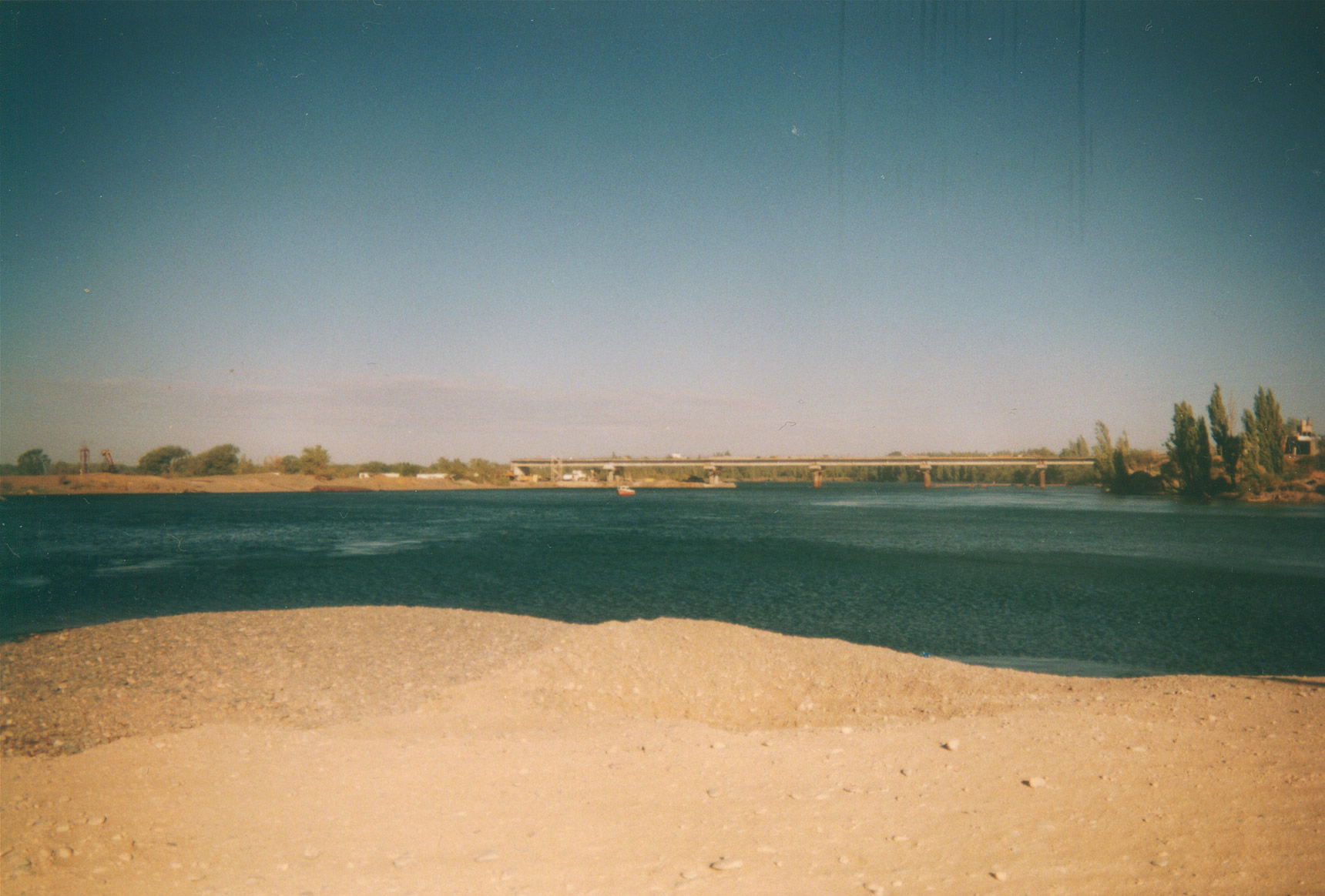 Puente en construcción en el Paso Las Perlas sobre el Río Limay, límite natural entre las provincias de Río Negro y Neuquén. Este puente reemplazó el servicio de balsas existente hasta el año 2001. Al fondo, provincia de Río Negro.